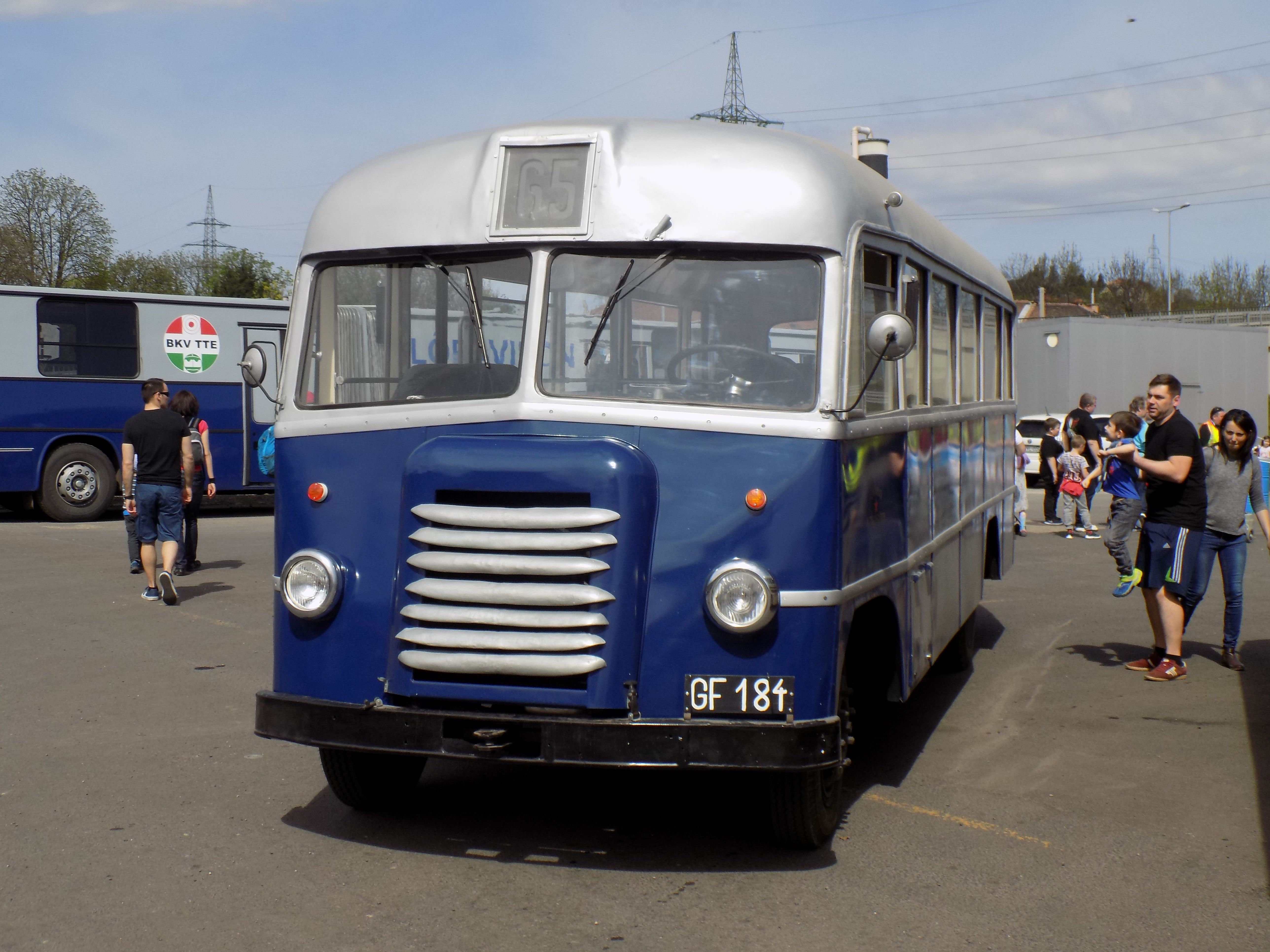 Rába Tr3,5 autóbusz az óbudai nyílt napon